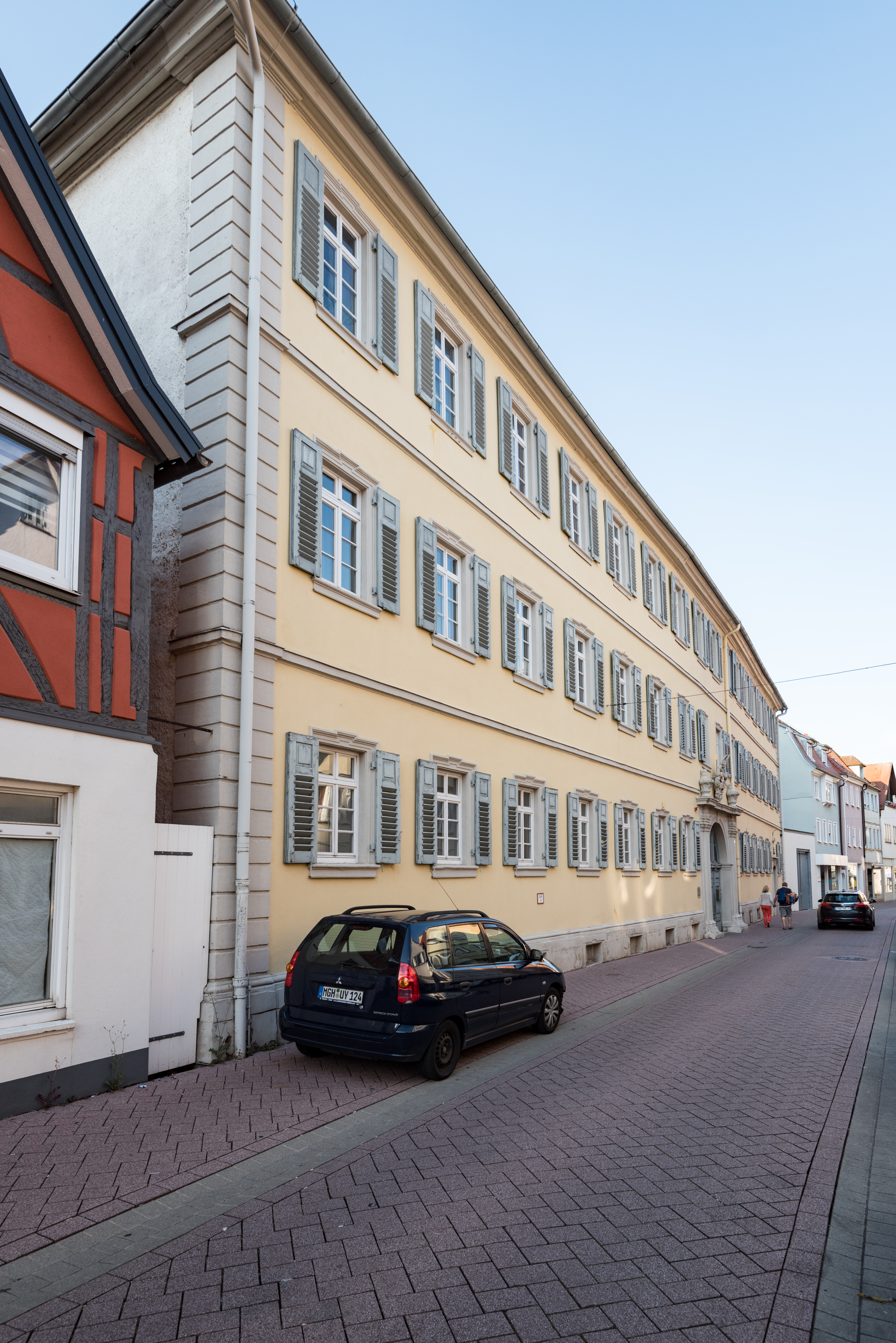 Bad Mergentheim, Mühlwehrstraße 12